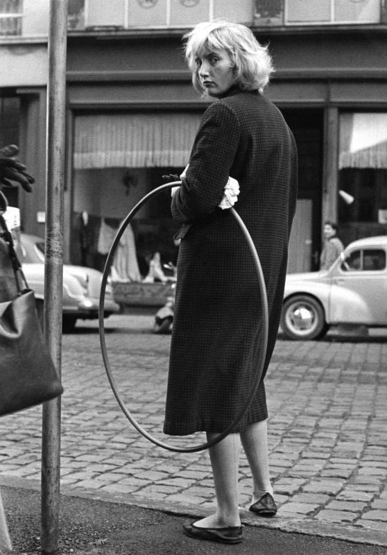 Dezember 1958 "Hula Hupp", Modekrankheit oder Sport?